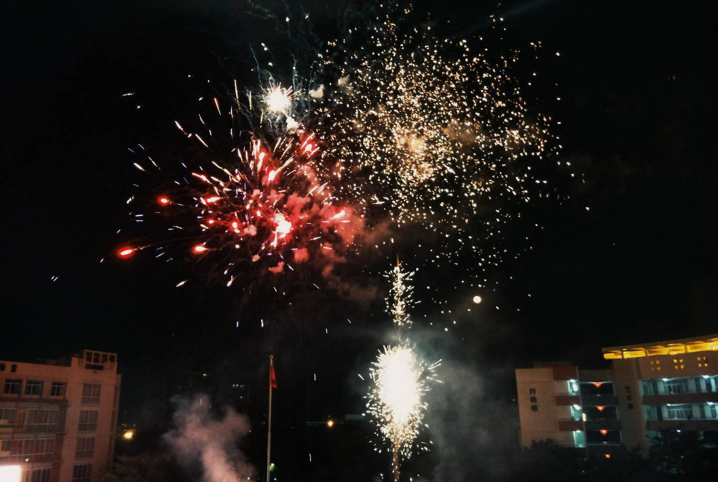 广州市第二中学科学城校区2017年元宵节烟花